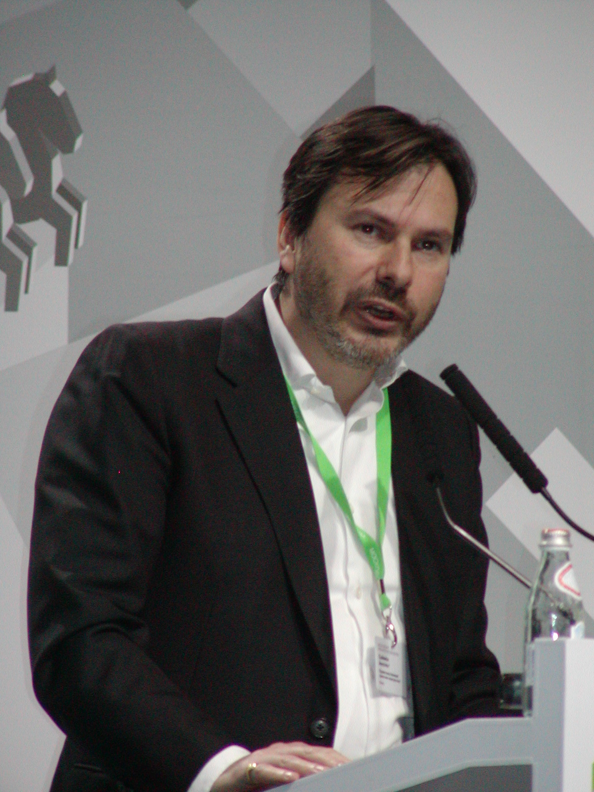 Саймон Анхольт на 2-м Московском урбанистическом форуме 4 декабря 2012 года